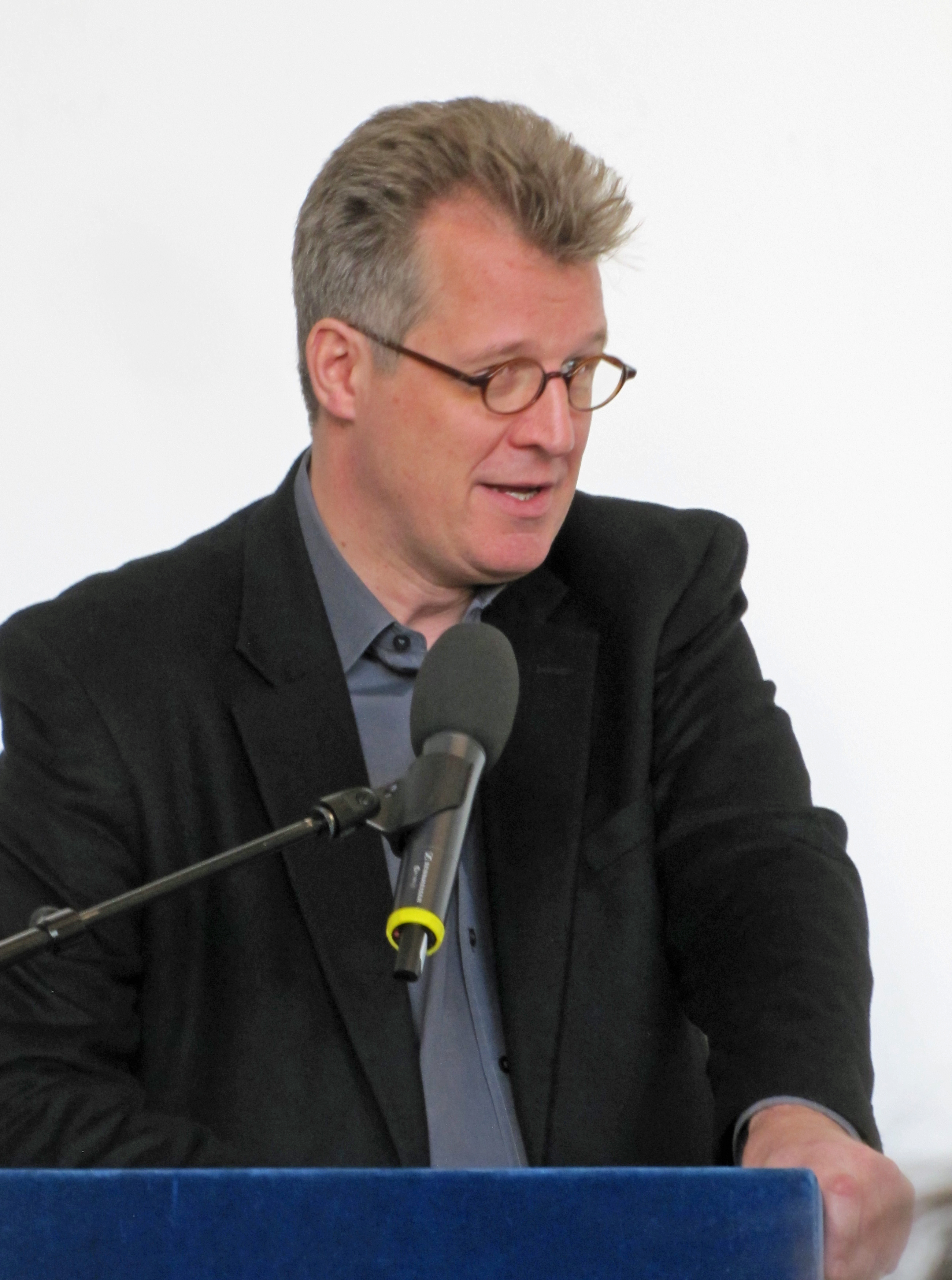 Philipp Blom, bei den 44. Römerberggesprächen, Thema:Sehnsucht nach Grenzen, im Dezember 2016 im Chagall-Saal der Städtischen Bühnen in Frankfurt am Main.